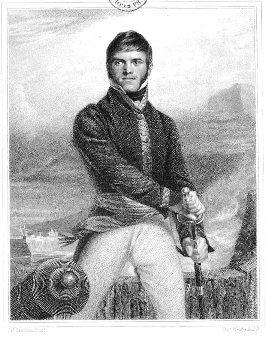 General Xavier Mina, grabado de Thomas Wright por pintura de James Harrison. Pub.d by Lackington Hughes & C.º, Londres, 1821. Una copia del mismo grabado figura al frente de las "Memorias de la revolucion de Megico y de la espedición [sic] del General D. Francisco Javier Mina: a que se han agregado algunas observaciones sobre la comunicacion proyectada entre los dos oceanos, Pacifico y Atlantico / escritas en ingles por William Davis Robinson ; y traducidas por Jose Joaquin de Mora", con una inscripción al pie que dice: "El general Javiier Mina, copia del original pintado pocos días antes de su salida de Inglaterra, que existe en poder de Thomas Broadwood. Biblioteca Nacional de España.